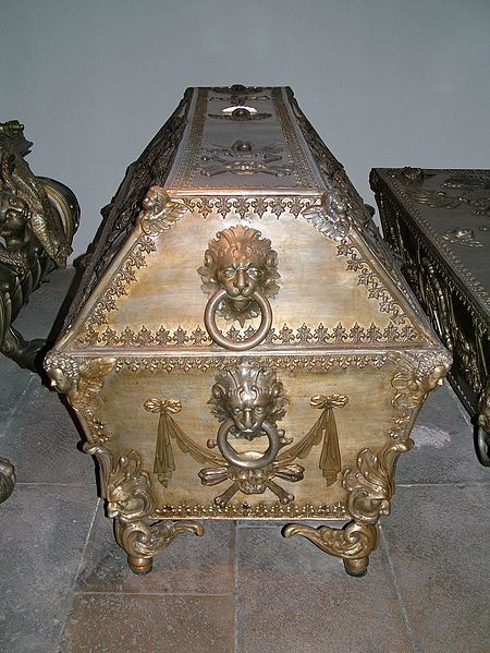 Grab Kaiserin Maria Anna